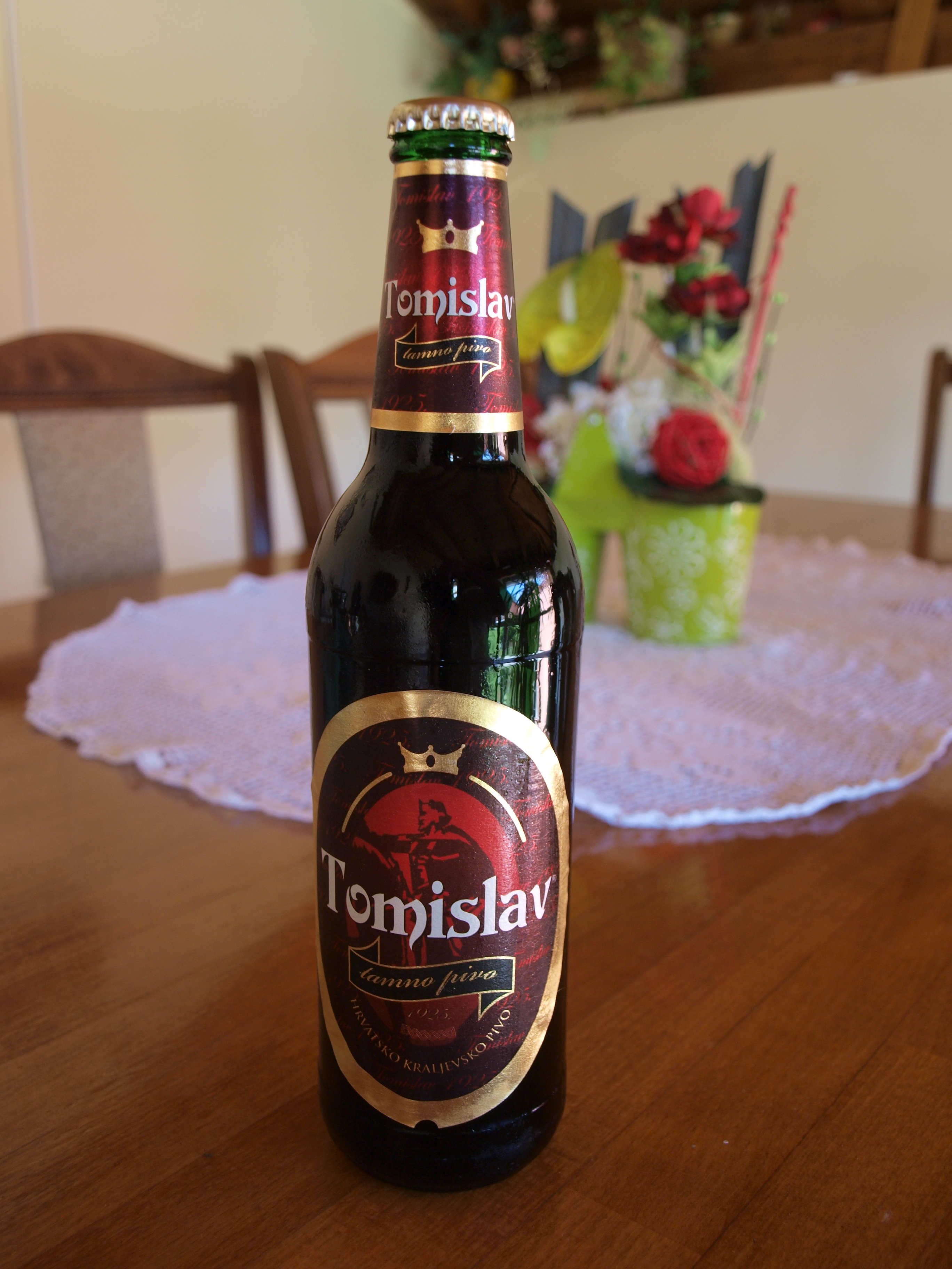 Pivo Tomislav